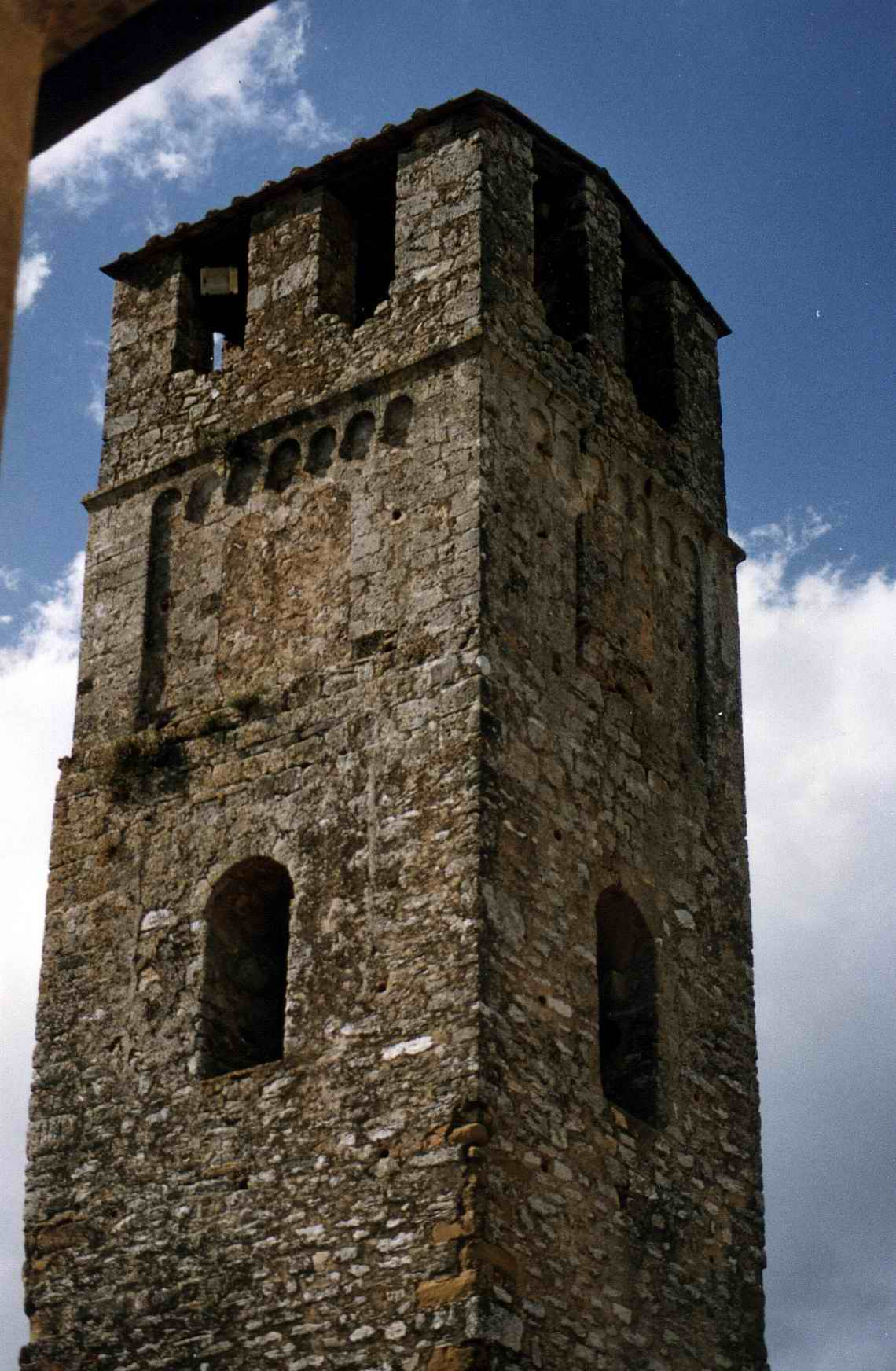 Sovicille (Siena-Italia): Il campanile della chiesa di Pernina